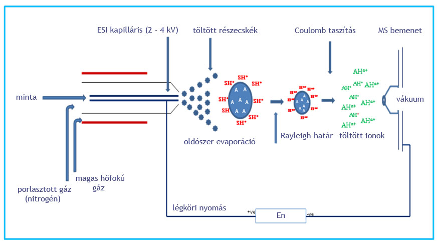 MS ionizáció